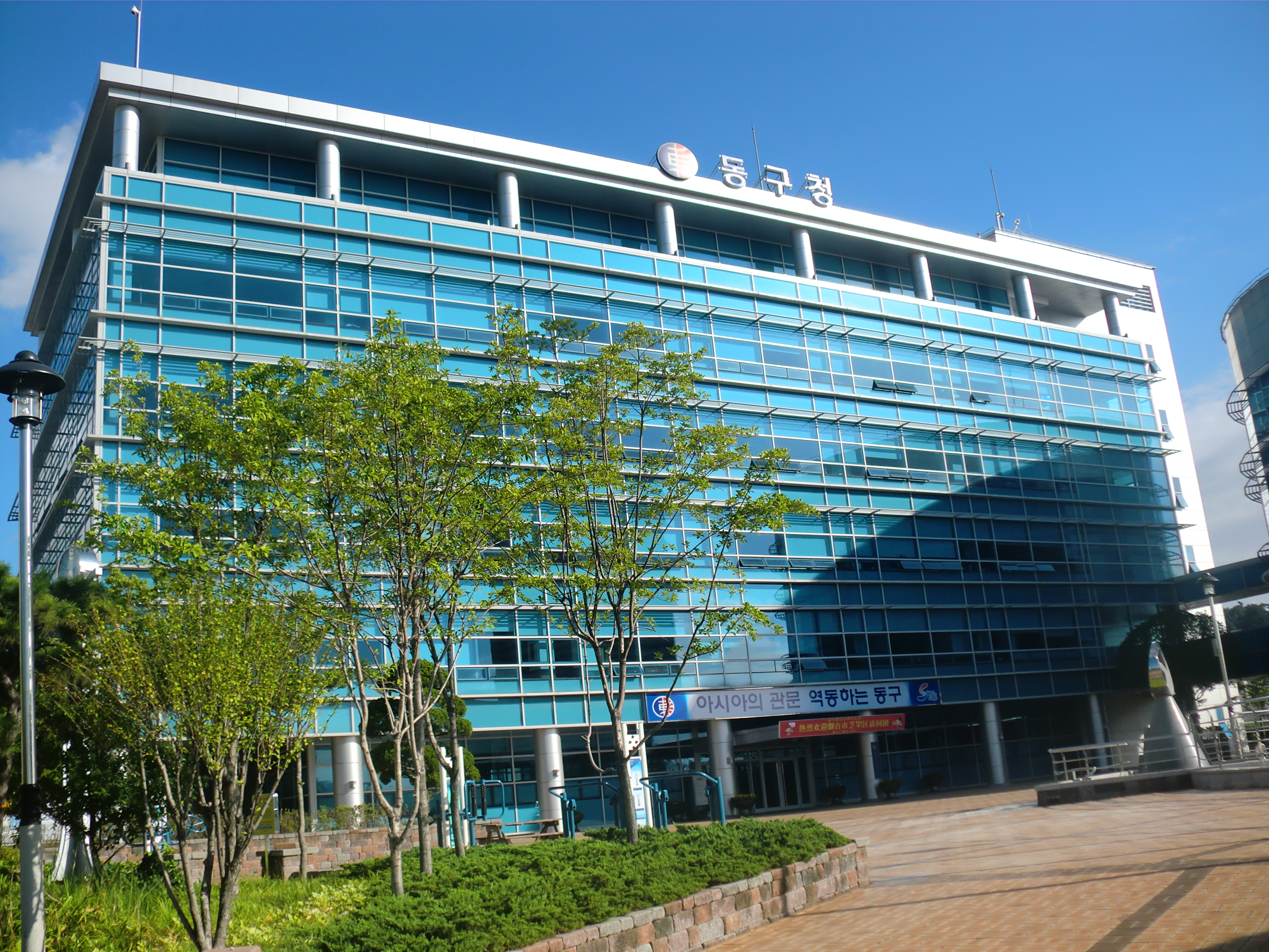 부산광역시 동구에 있는 동구청